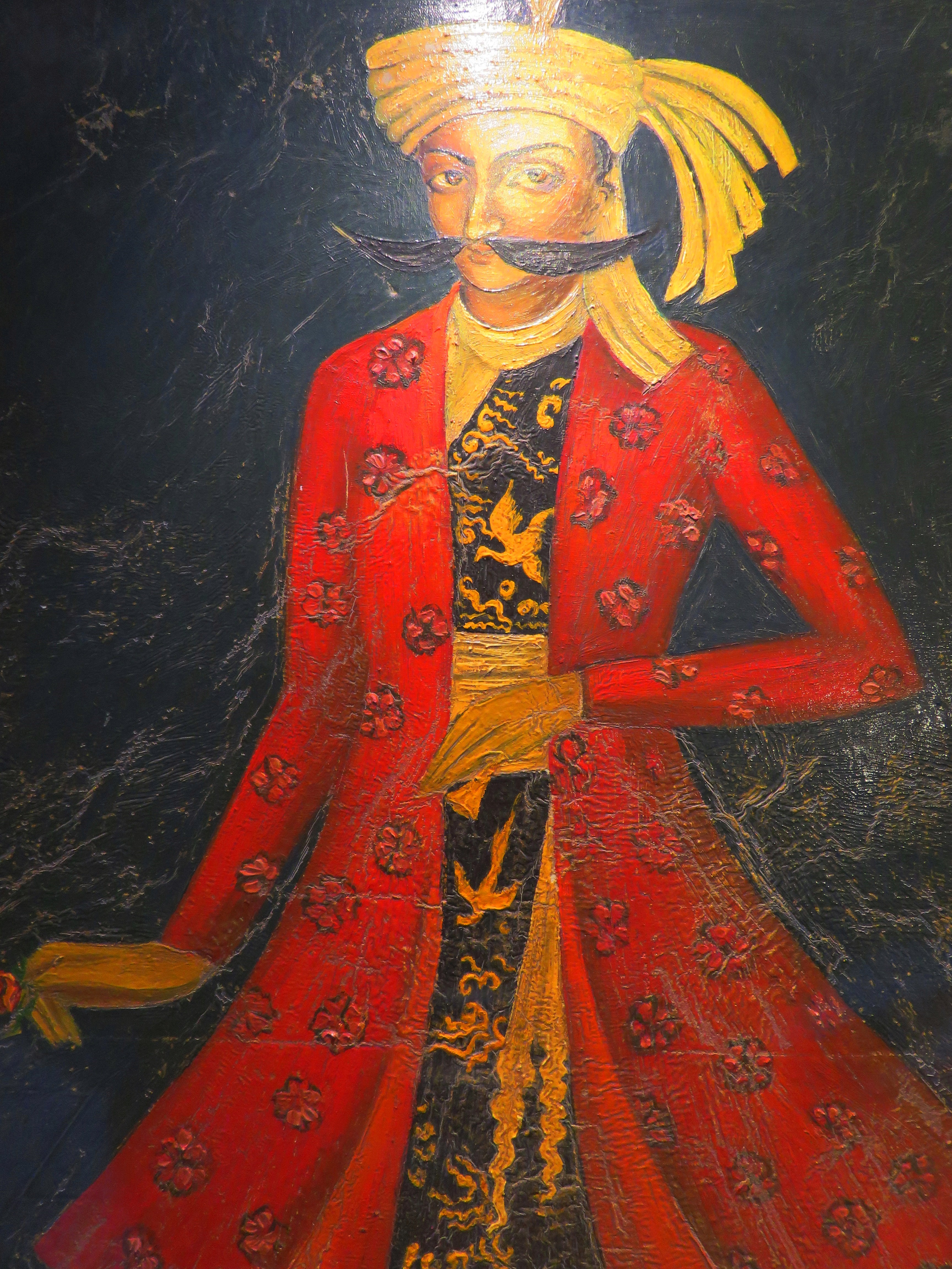 گنجعلی خان